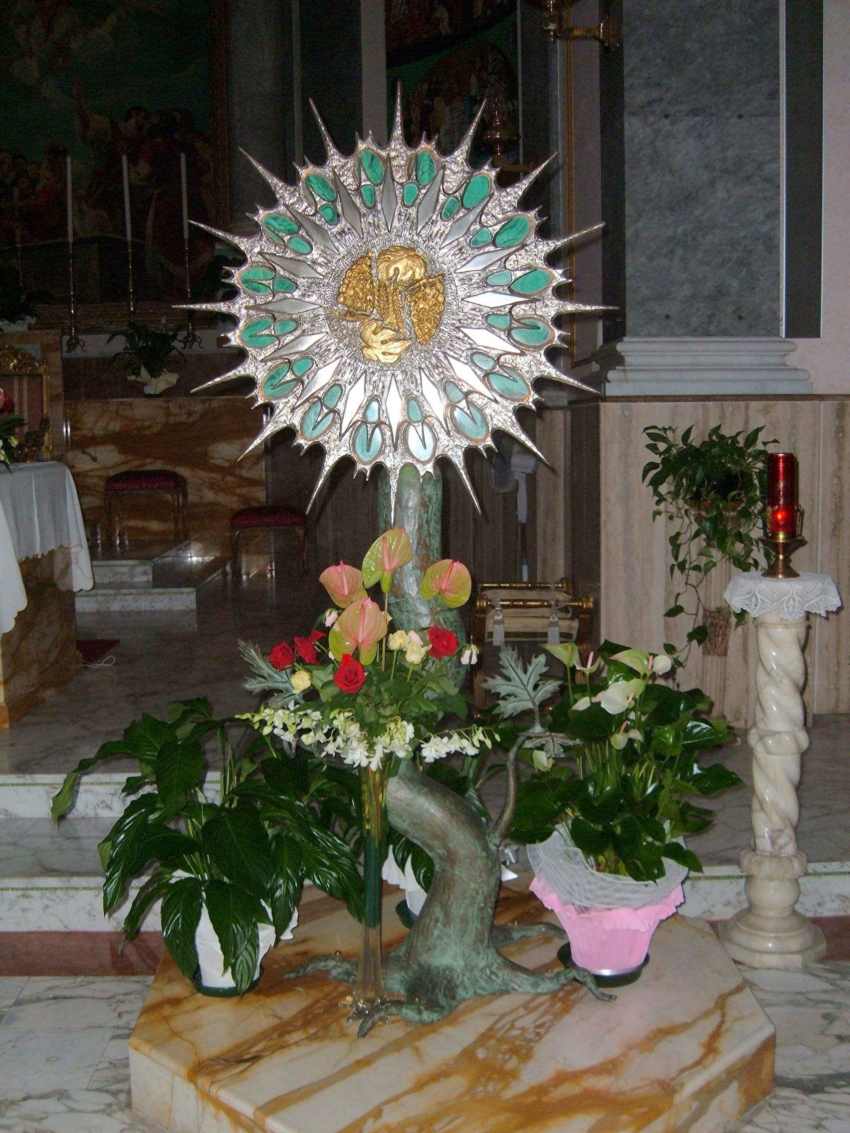 Chiesa parrocchiale di Santa Maria Assunta al Tufello, a Roma, nel quartiere Monte Sacro, in via Capraia. Tabernacolo.